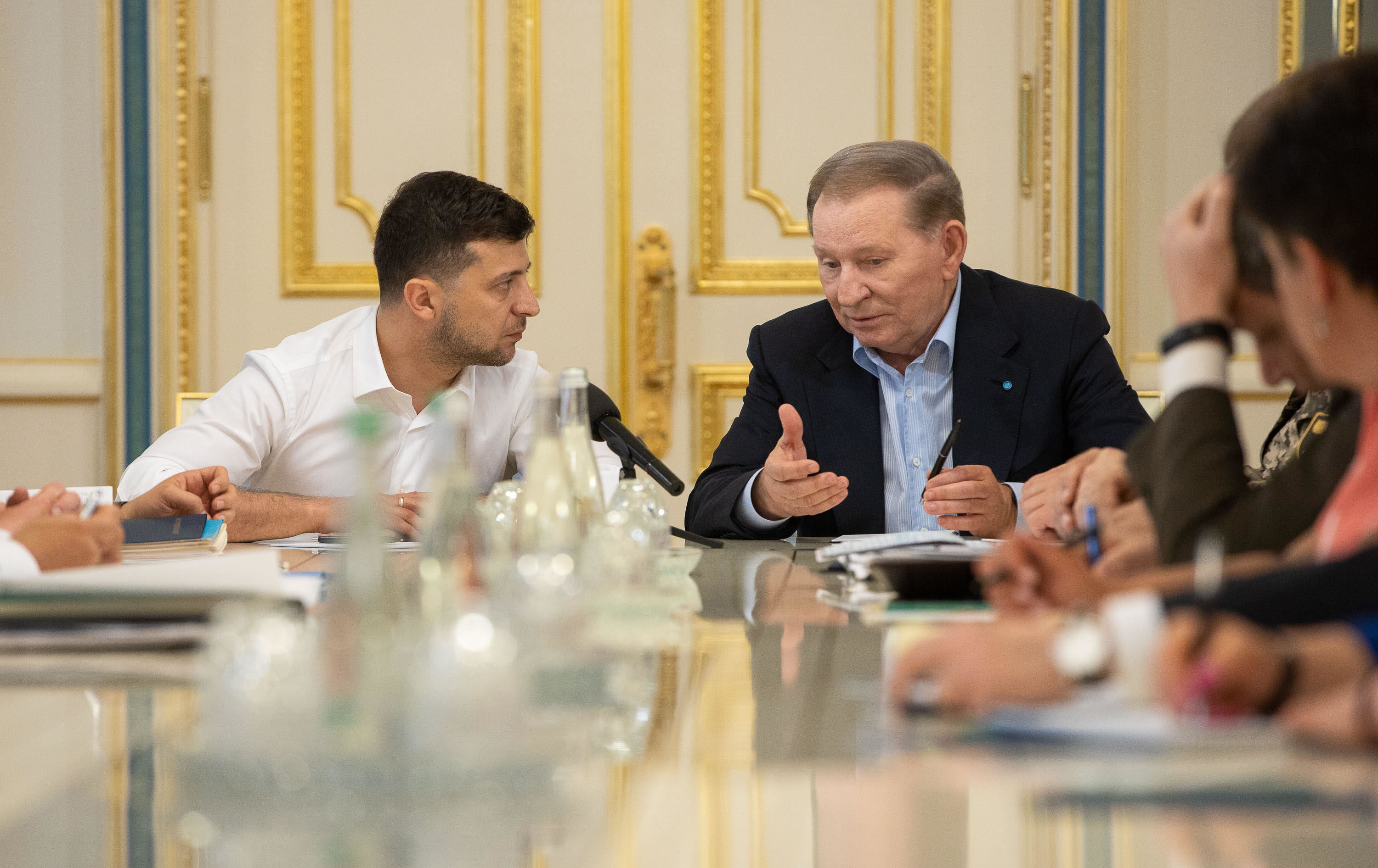 Встреча Президента Украины с членами украинской делегации Трехсторонней контактной группы по мирному урегулированию ситуации в Донбассе